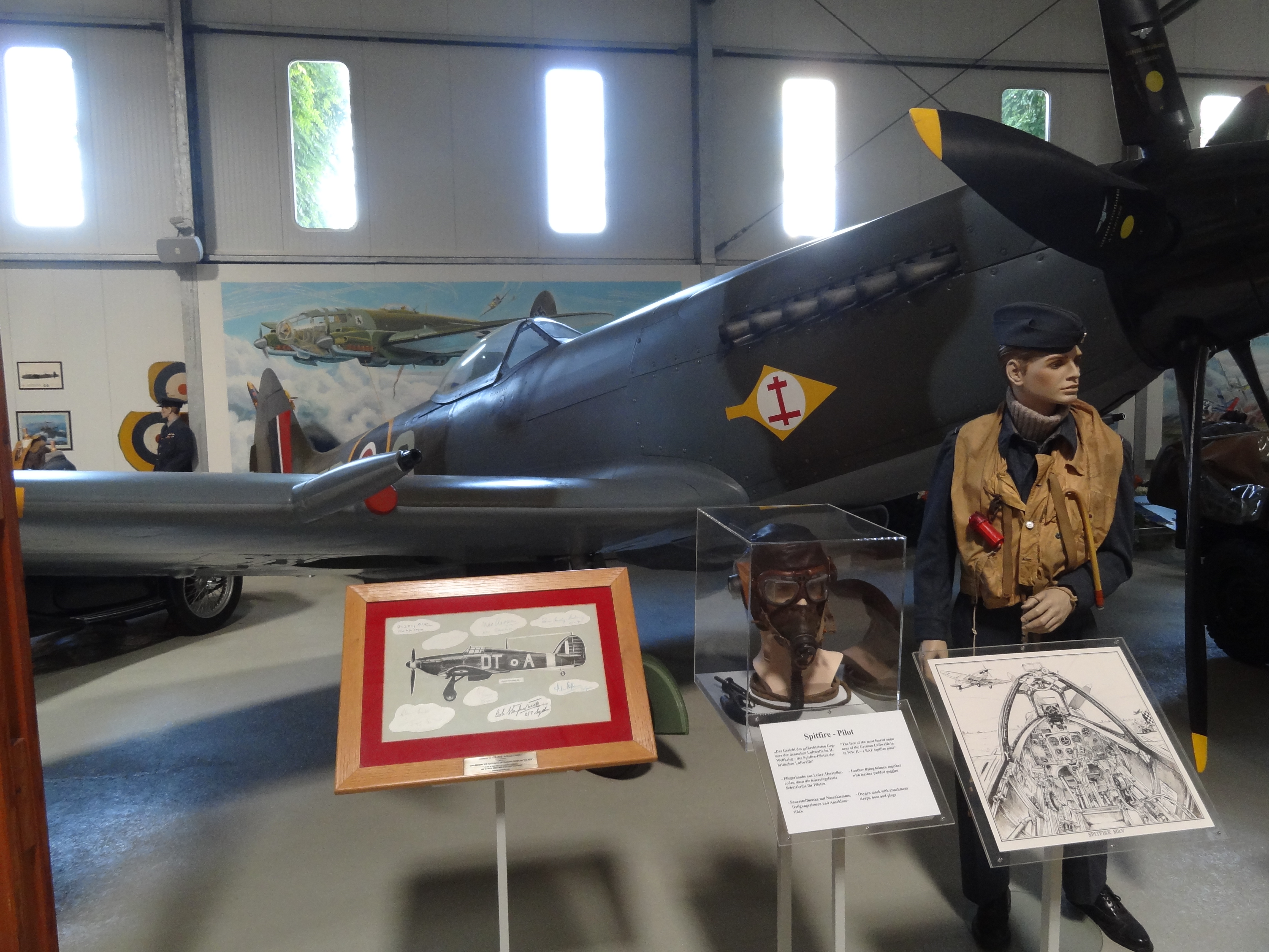 Spitfire Mk XIV, Luftfahrtmuseum Hannover-Laatzen